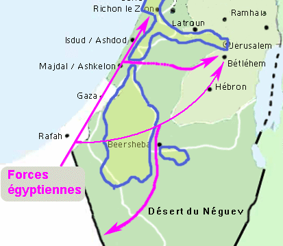 Axes d'attaques égptiens fin mai - début juin 1948